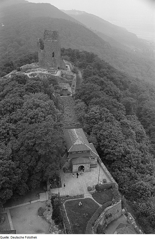 Original image description from the Deutsche Fotothek Blick vom Kyffhäuserdenkmal auf den Oberburgturm bzw. Barbarossaturm